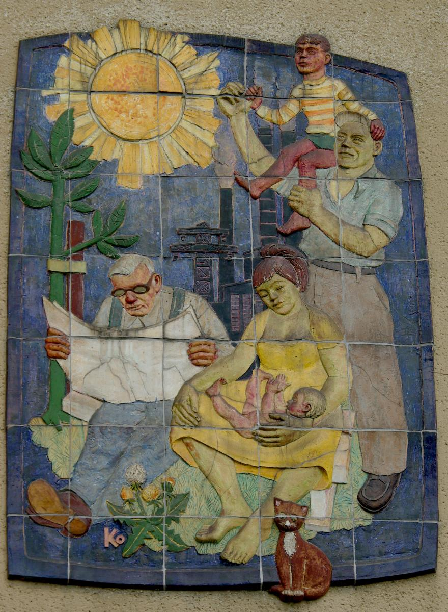 DDR Kunst am Bau, geschaffen von Karl Kothe im Jahr 1960. Das Keramikrelief befindet sich an der Seitenwand eines Wohnhauses in der Clara-Zetkin-Straße in Dessau-Roßlau, im Ortsteil Roßlau, in der Nähe der Schiffswerft.